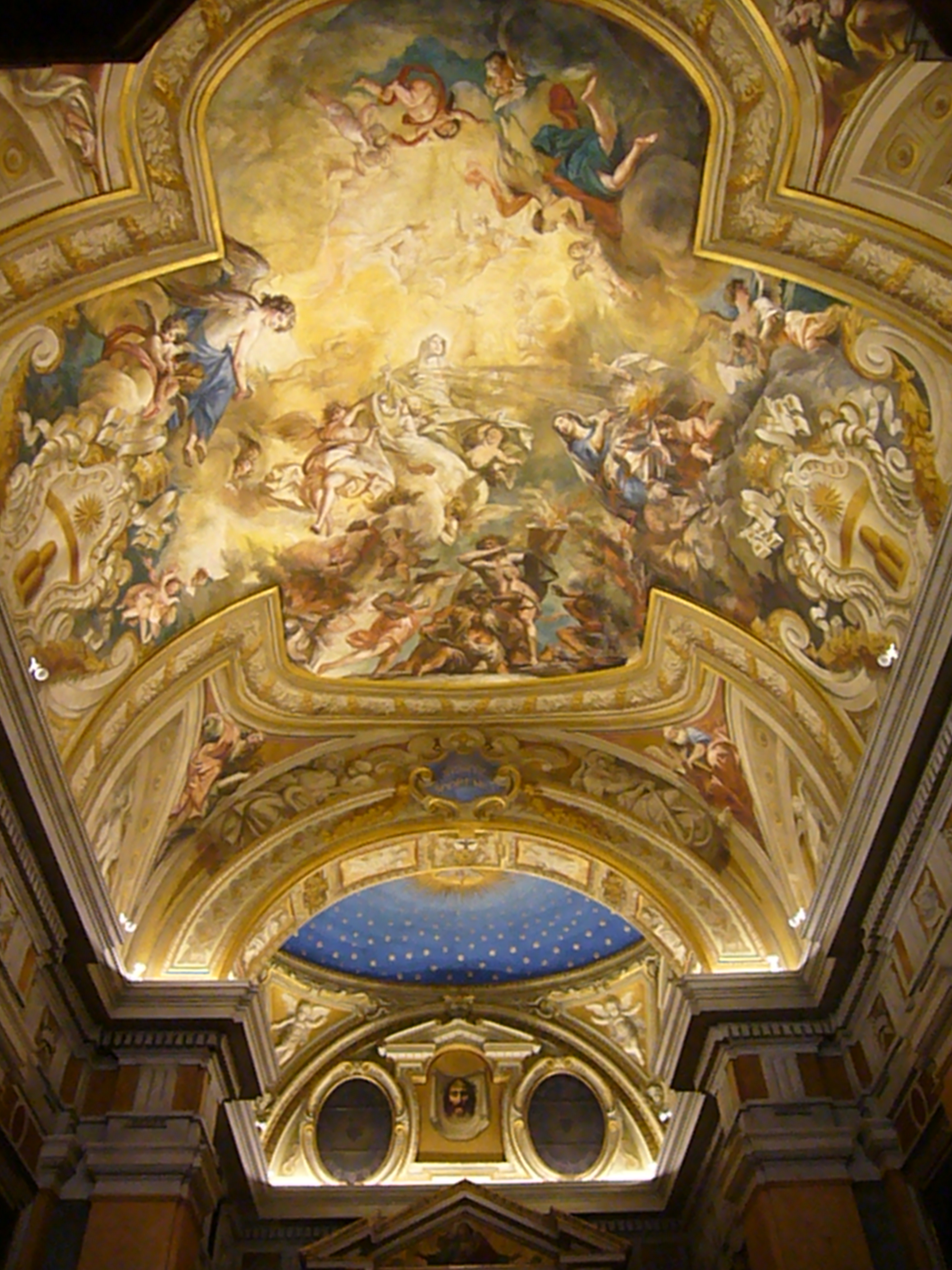 Roma, santa Birgitta a piazza Farnese, soffitto (Biagio Puccini, XVIII)